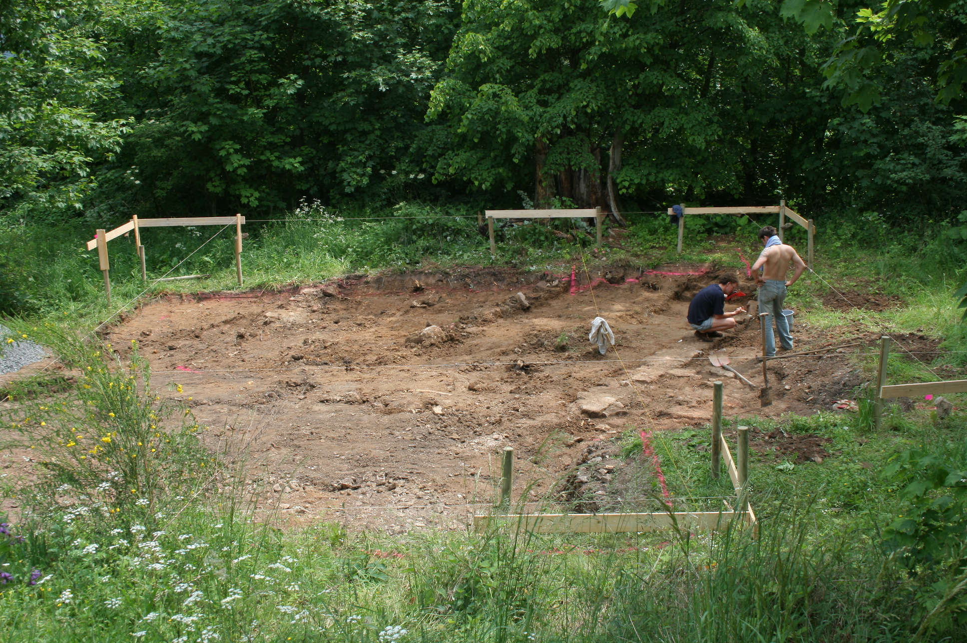 Ausgrabungsarbeiten im Mai 2007 bei der Burgruine Löwenstein (Hessen) in Bad Zwesten-Schiffelborn